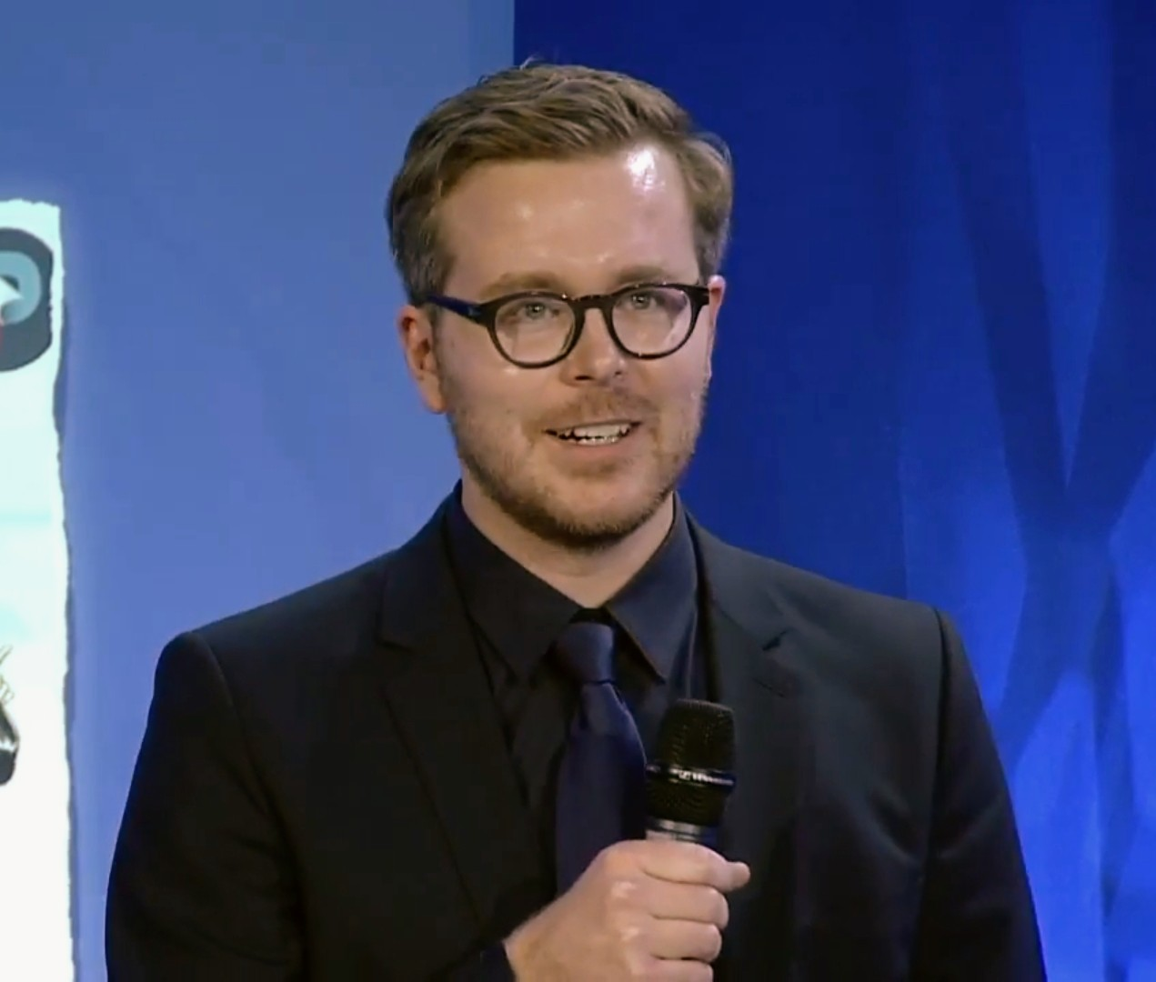 Den 1. Preis 2016 erhielten Sebastian Obermayer und Frederik Obermaier von der Süddeutschen Zeitung für die Enthüllung der Panama Papers. Die Laudatio wurde von Jury-Mitglied Volker Lilienthal gehalten.